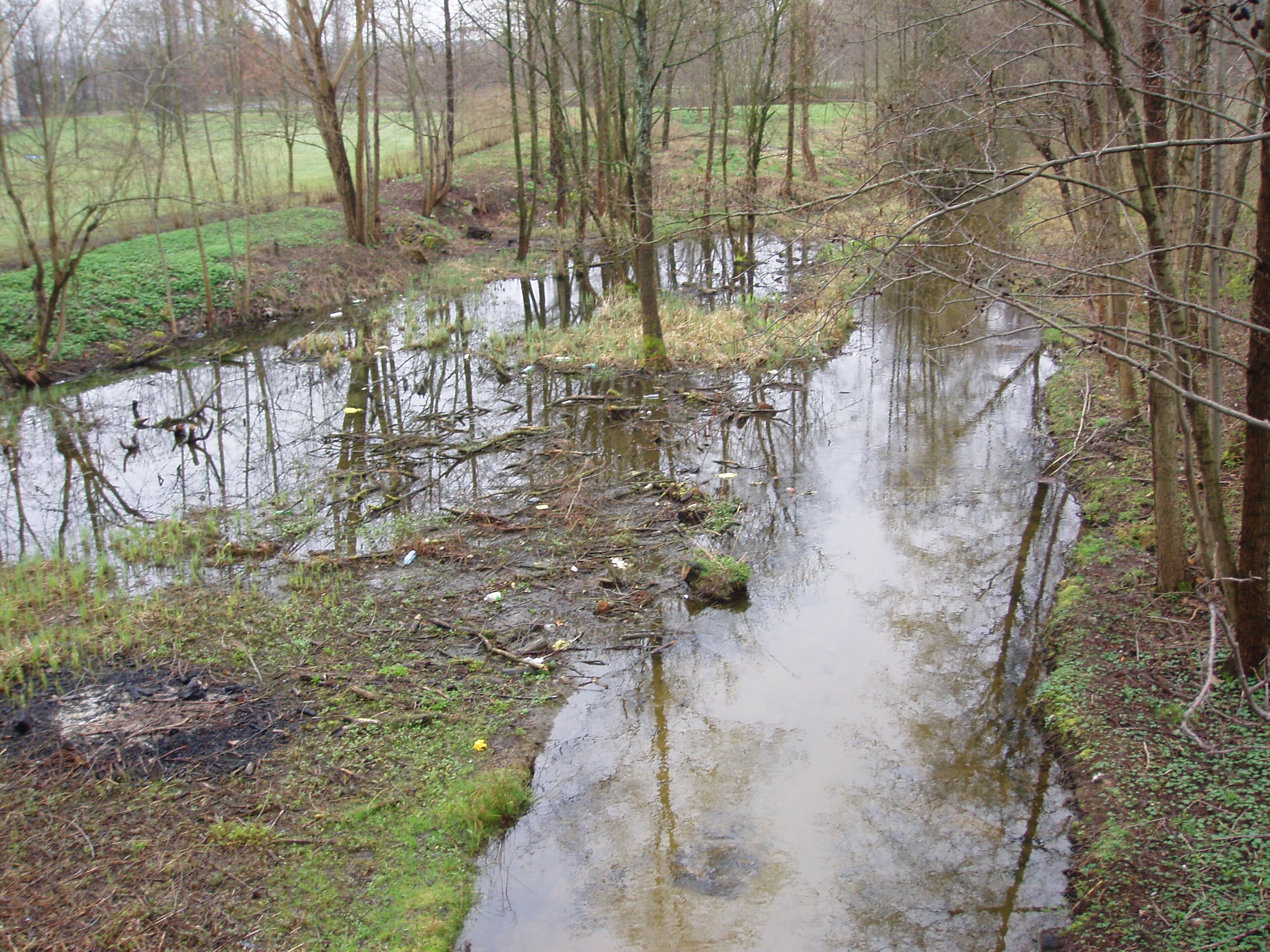 Olsztyn Kortowo, rzeka Kortówka, kwiecień 2008